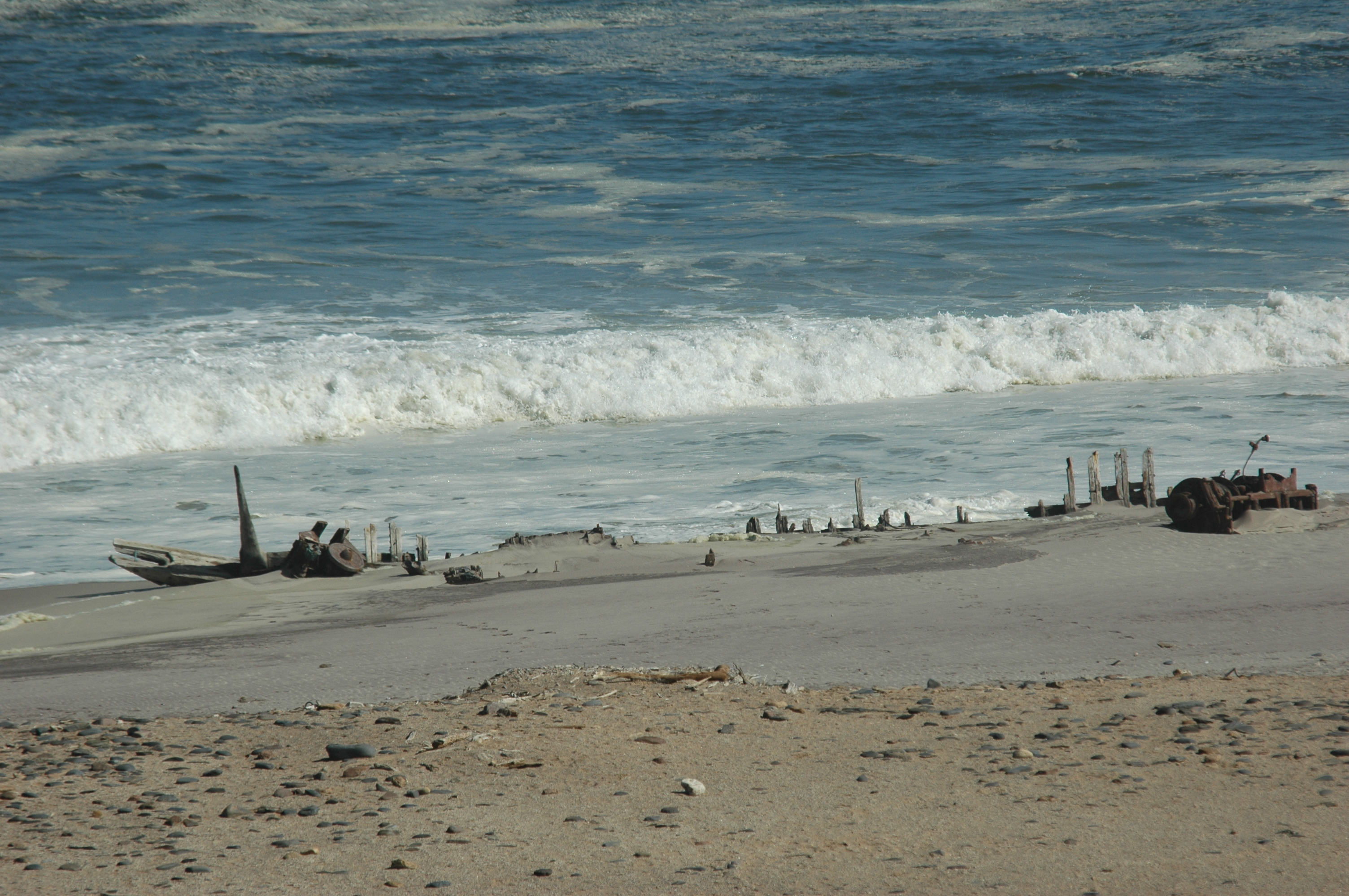 Namibie Skeleton Coast Photographie prise par GIRAUD Patrick